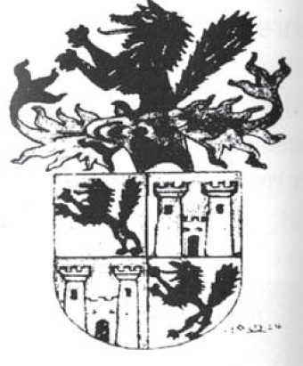 Wapen von de Familie Wolff von der Wolffsburg, adelt 1692